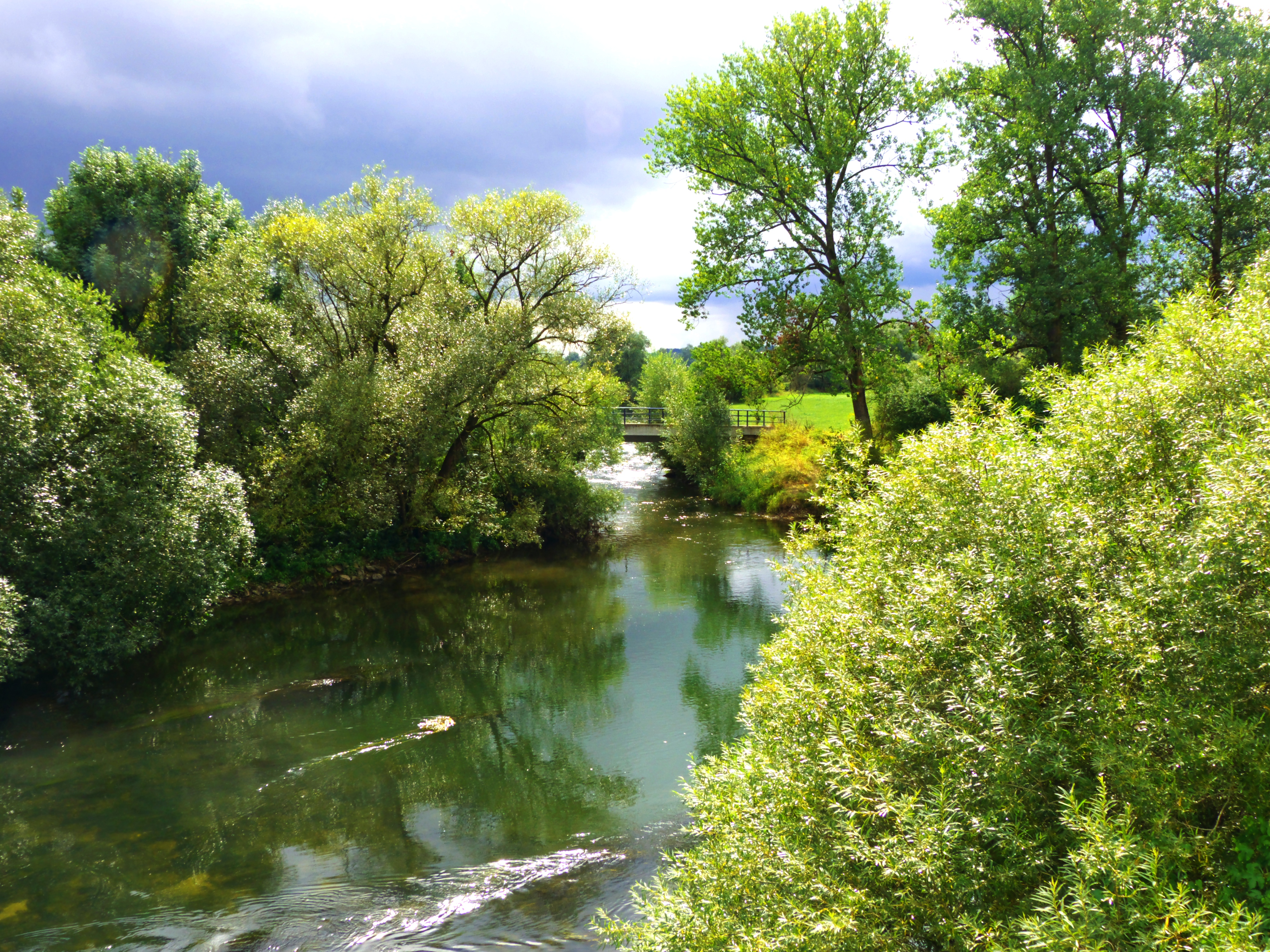 Danube